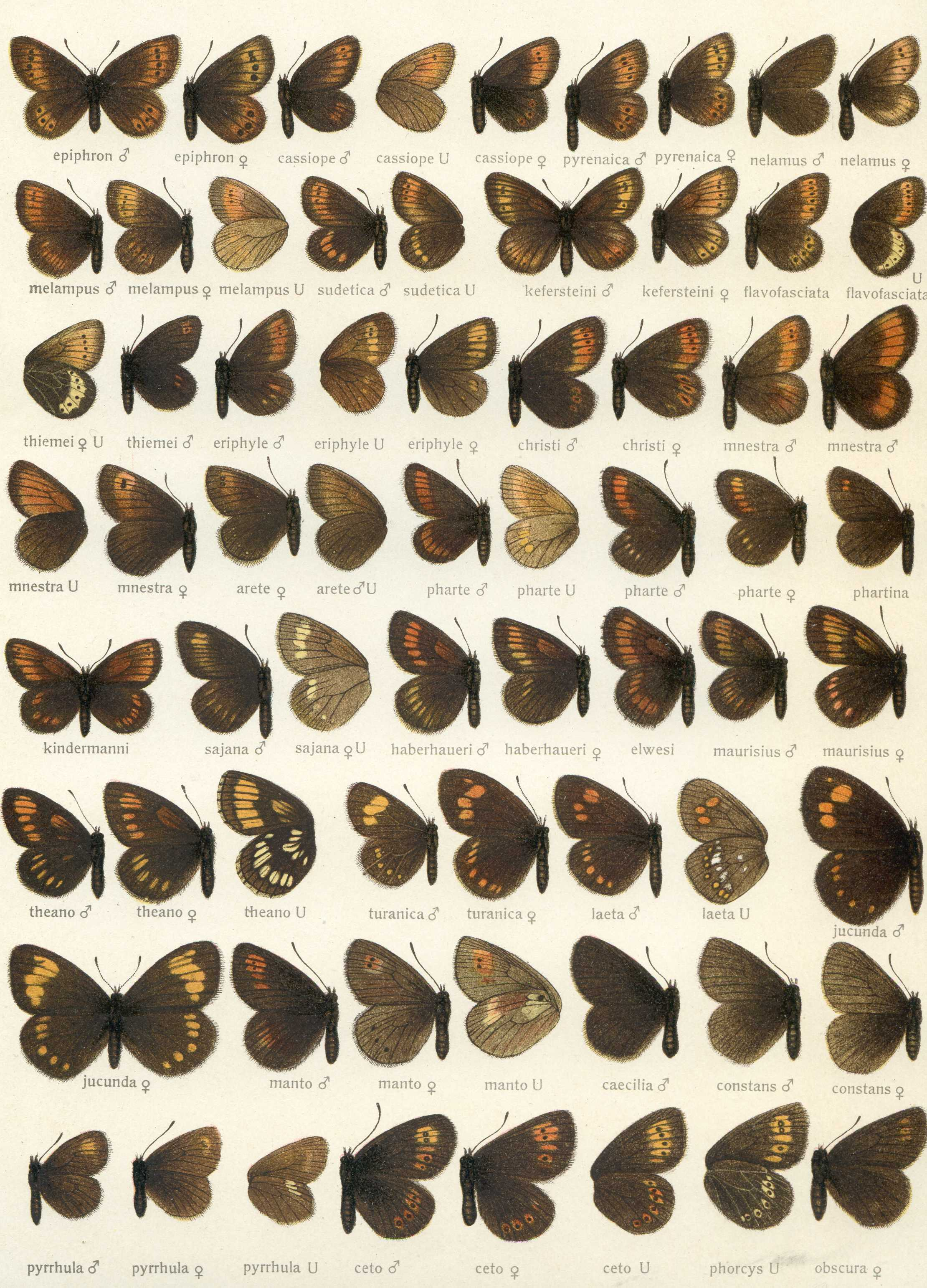 Plate from Seitz, A. Ed., 1900-1909 Die Großschmetterlinge der Erde, Verlag Alfred Kernen, Stuttgart Band 4: Abt. 1, Die Großschmetterlinge des palaearktischen Faunengebietes, Die spannerartigen Nachtfalter (The Macrolepidoptera of the world : a systematic account of all the known Macrolepidoptera) Band 1: Abt. 1, Die Großschmetterlinge des palaearktischen Faunengebietes, Die palaearktischen Tagfalter. read text (in German) See The Global Lepidoptera Names Index for valid names